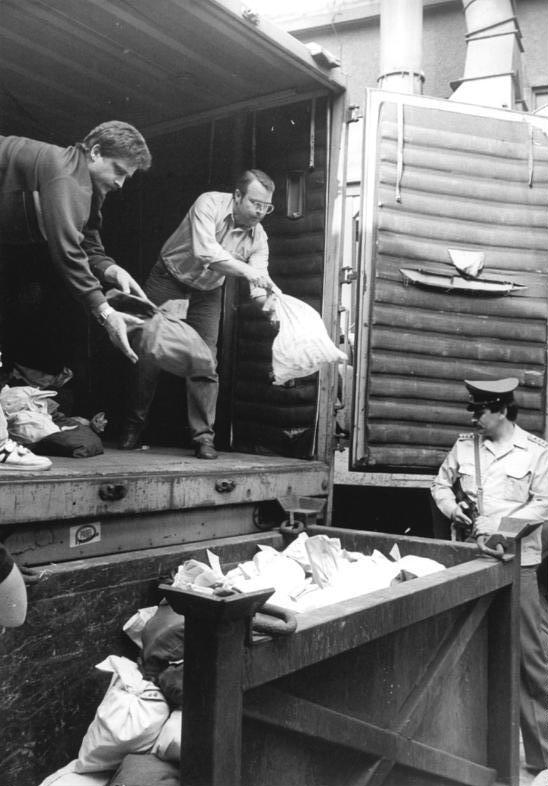 ADN-Gahlbeck-Bez. Leipzig: Gleich nach dem Abladen werden im Leichtmetallwerk Rackwitz - einzige Aufbereitungsanlage der DDR - die von der Staatsbank angelieferten Geldsäcke mit Münzen eingeschmolzen.